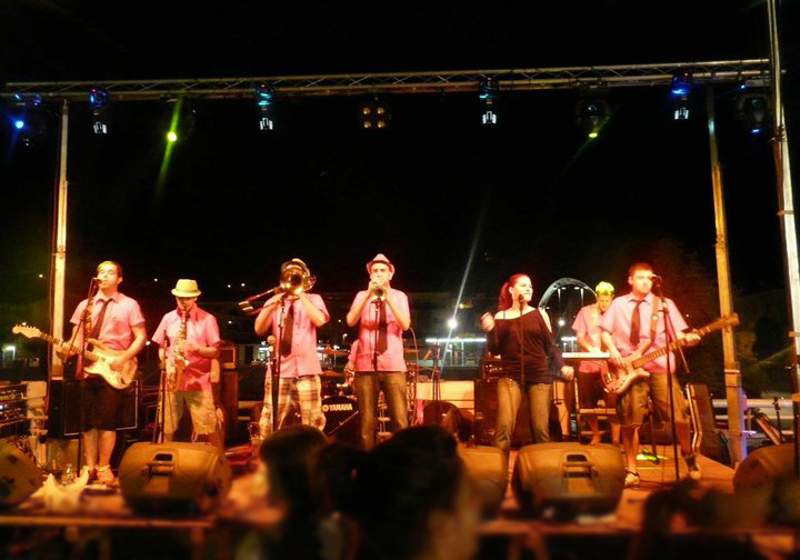 Concierto de Hot Numbers en su ciudad, Balaguer. Hot Numbers es una banda formada en Balaguer, Lérida en 1996. Su música está basada en la fusión de estilos musicales como ska, reggae, punk y distintos estilos de rock.